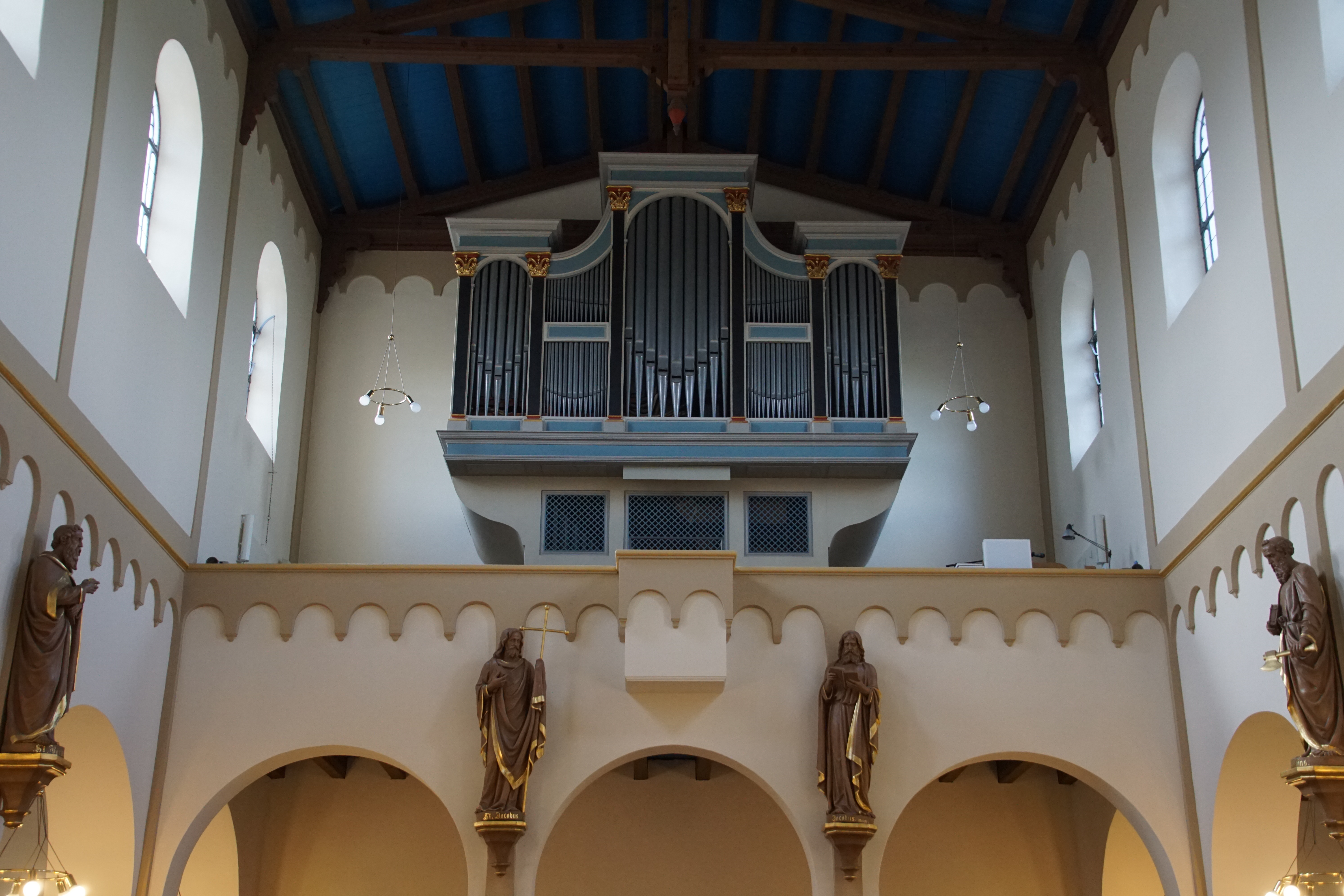 Katholische Kirche St. Margareta in Stieldorf, Königswinter